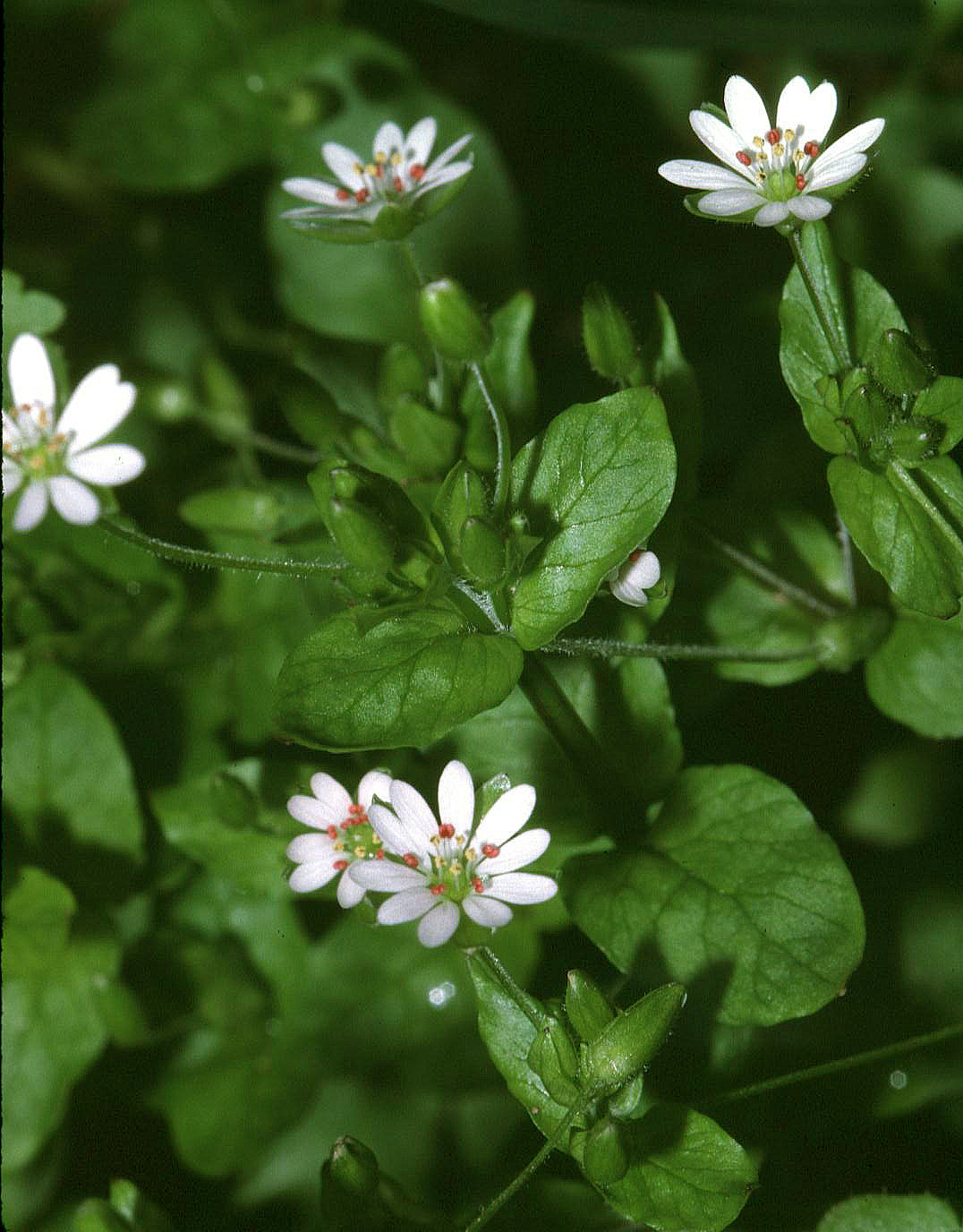 Stellaria neglecta, eigenes Foto von 1990, Unterfranken, Fornax, lizenz Bild-PD